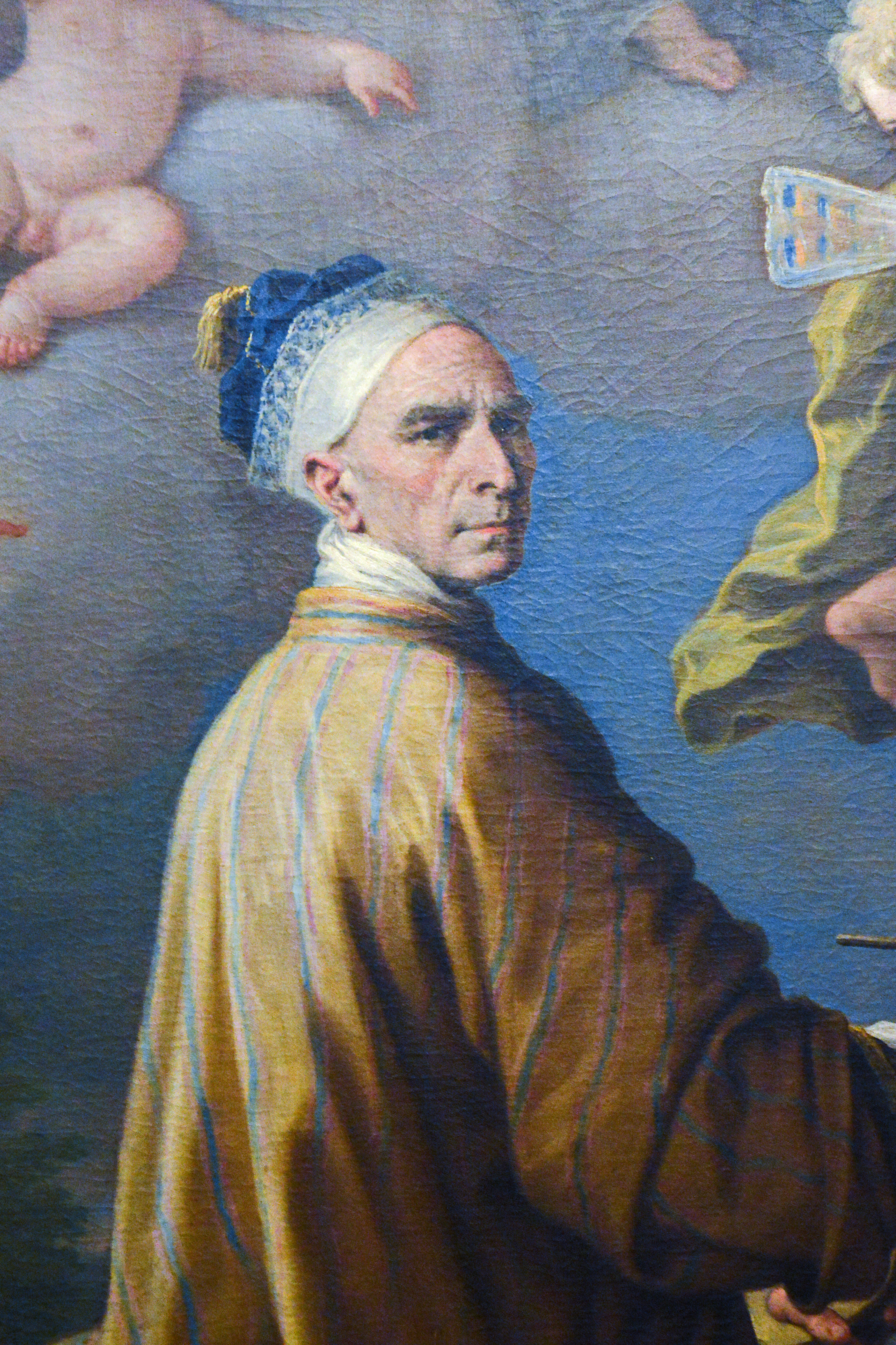 Self-portrait detail